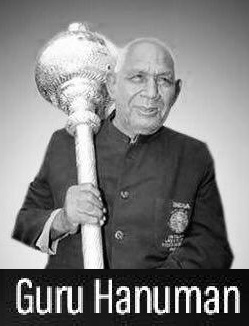 पद्मश्री द्रोणाचार्य गुरु हनुमान जी